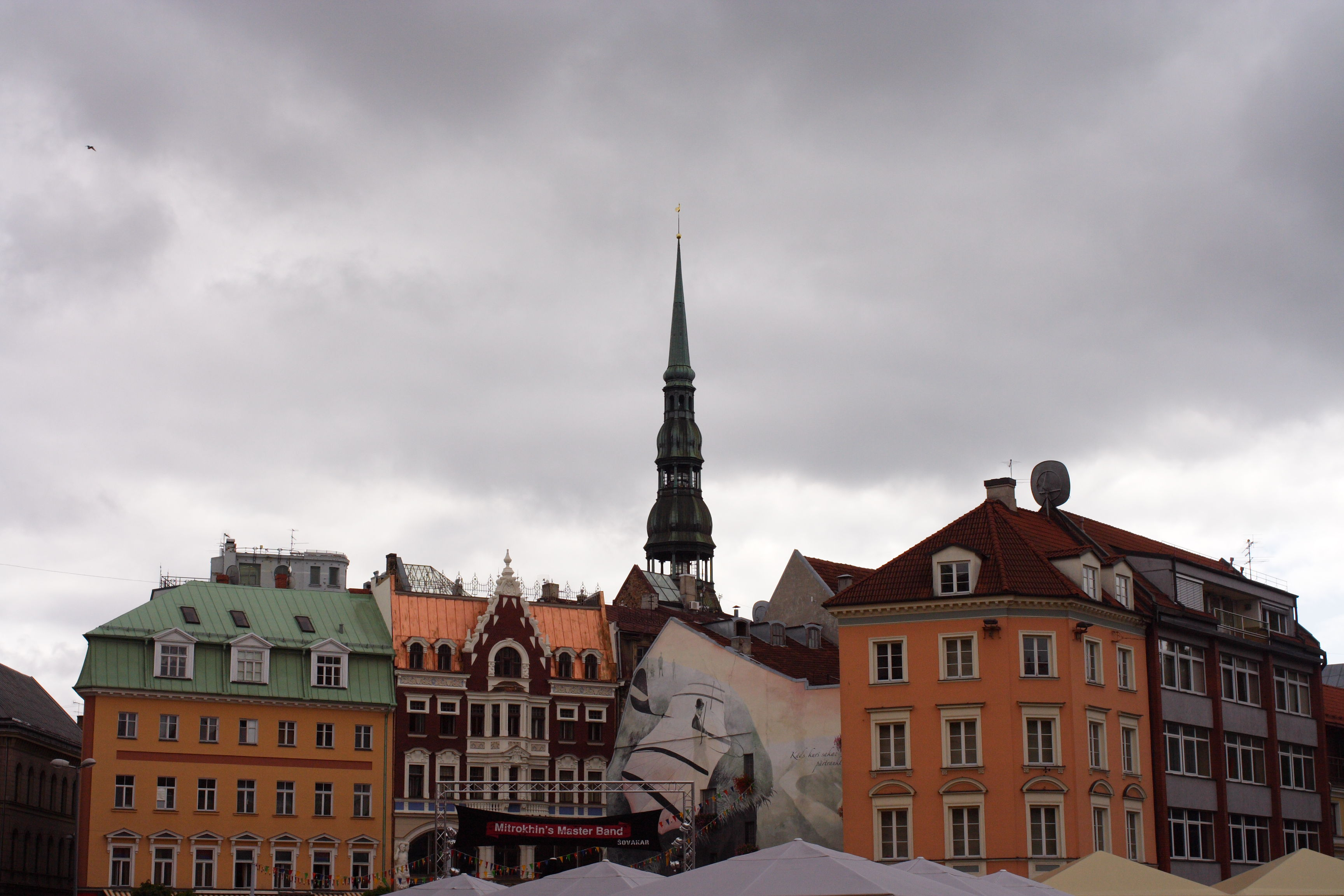 Дом Детмана (несколько заслонён транспарантом) в ряду городской застройки в Риге